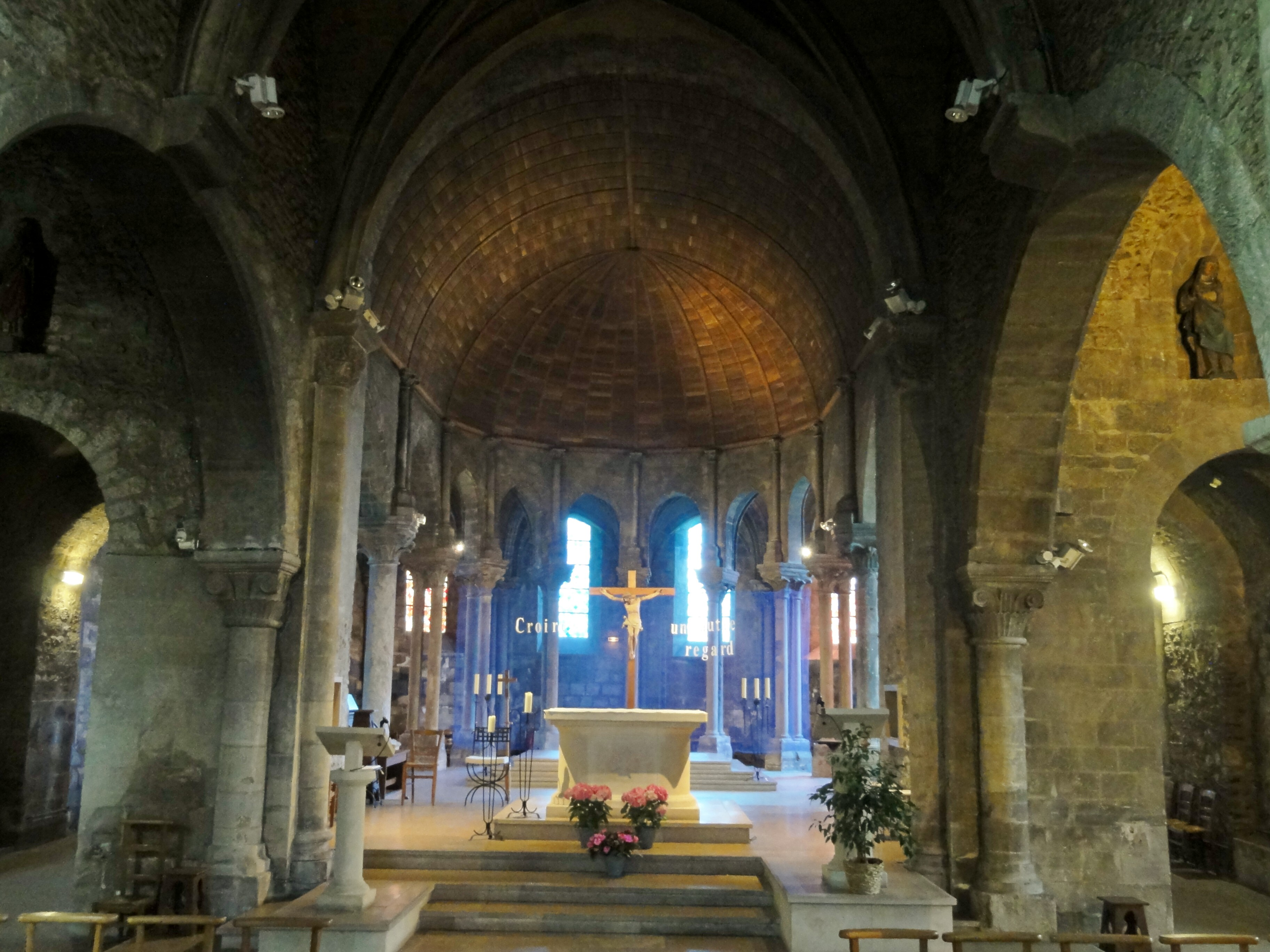 Chœur.